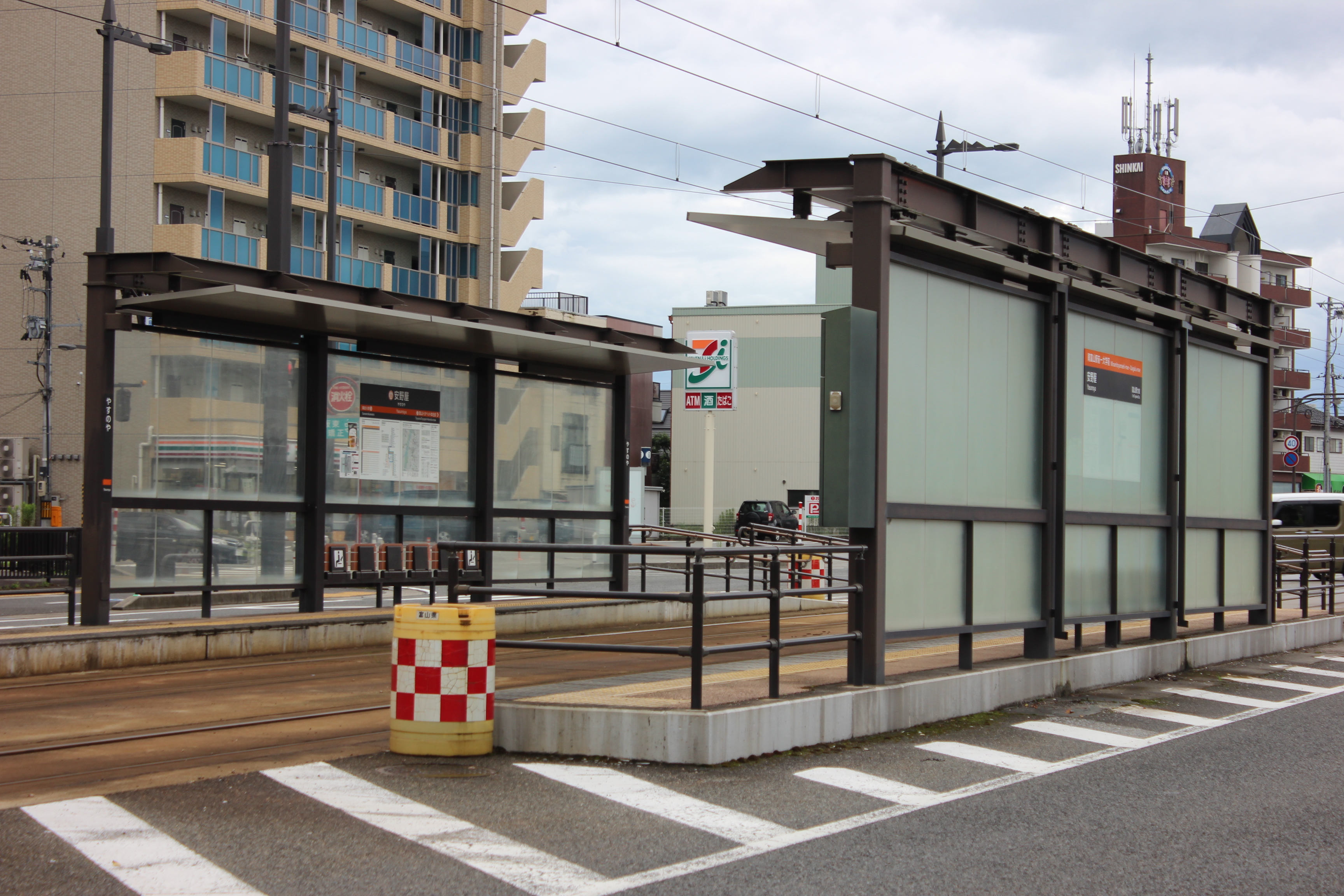 富山地方鉄道富山軌道線安野屋停留場